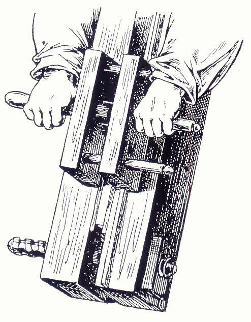 Beschneiden eines Buches mit dem Beschneidehobel